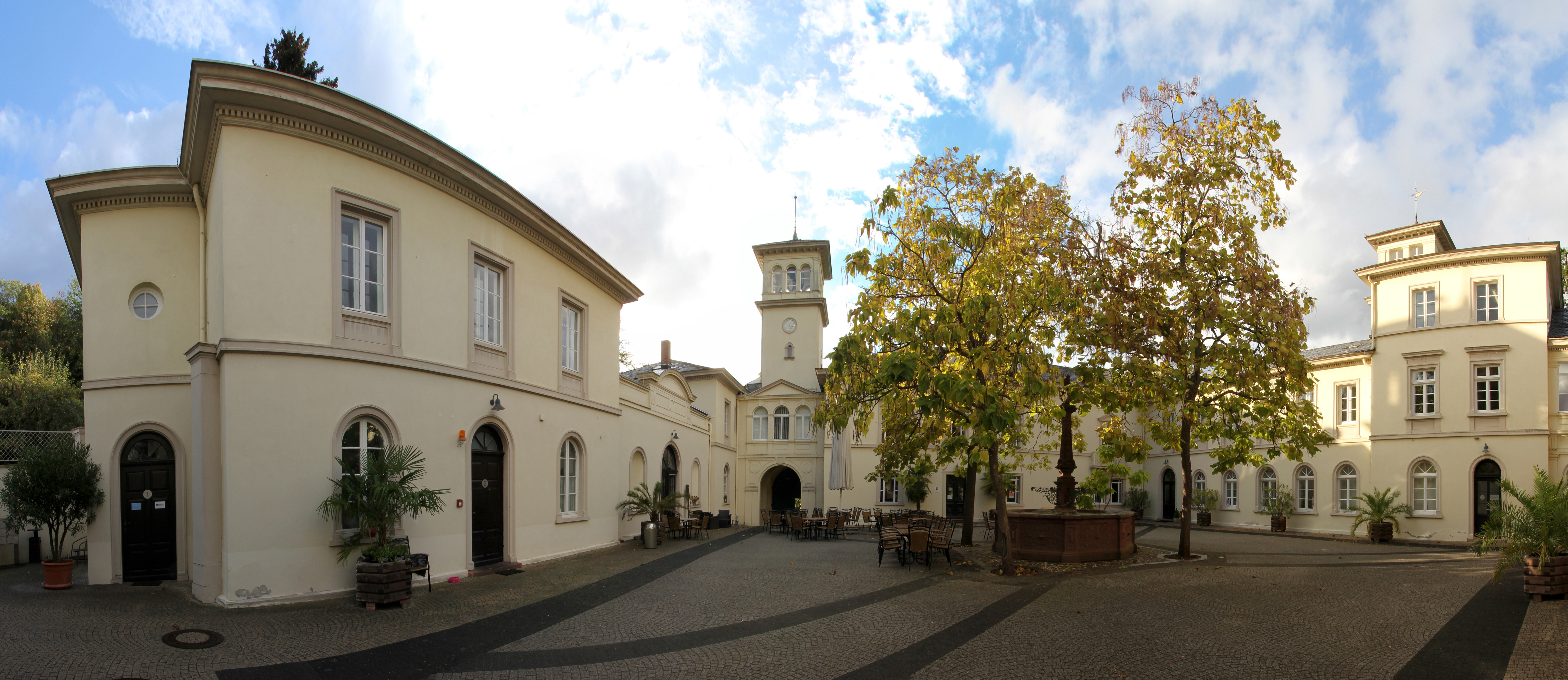 Schloss Heiligenberg (Jugenheim); Panoramafoto des Schlosshofs